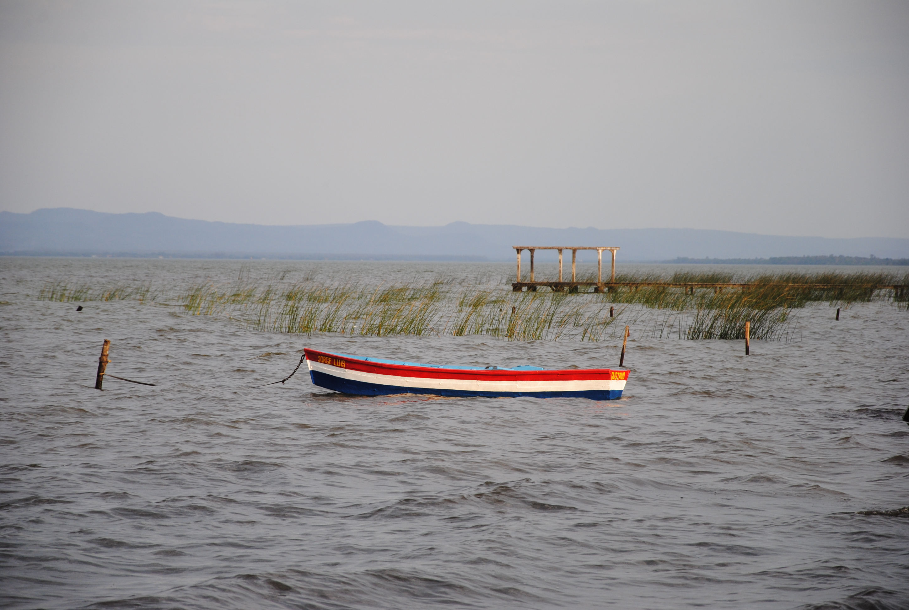 Lago Ypacarai visto desde Areguá, Paraguay